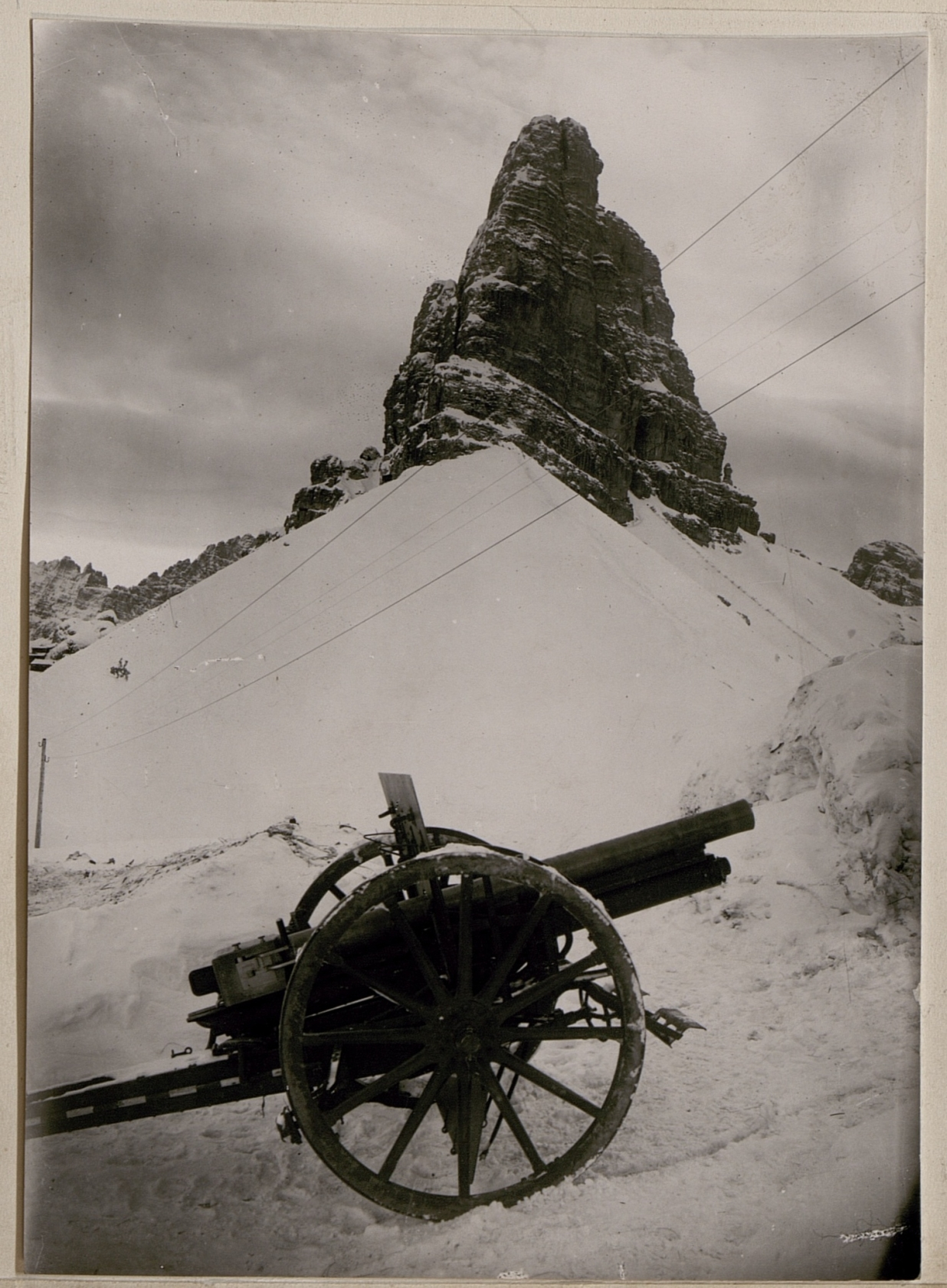 Feldkanone M. 5 am Zinnenplateau mit Toblingerknoten